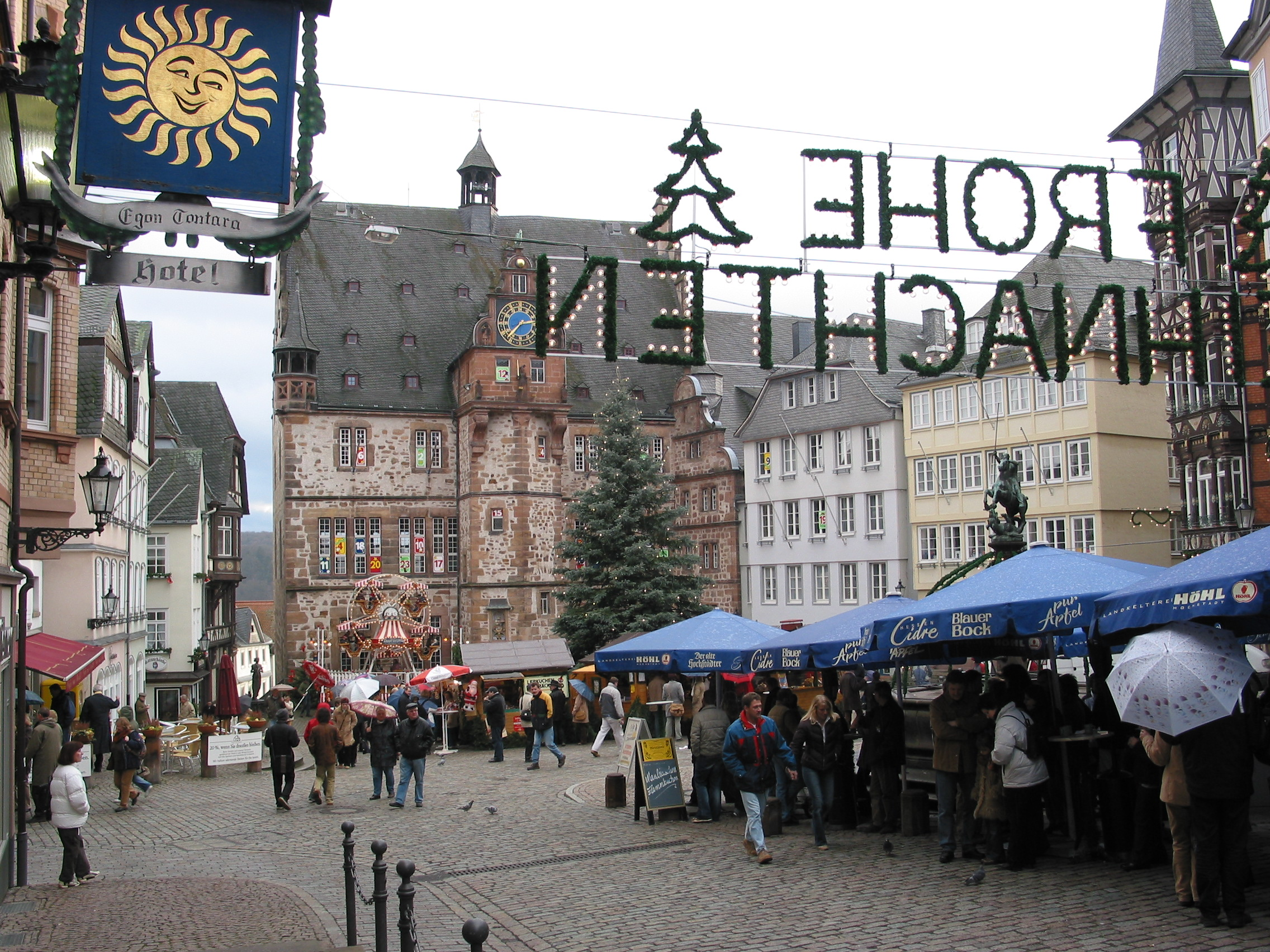 Adventsmarkt am Rathaus in Marburg (Lahn)